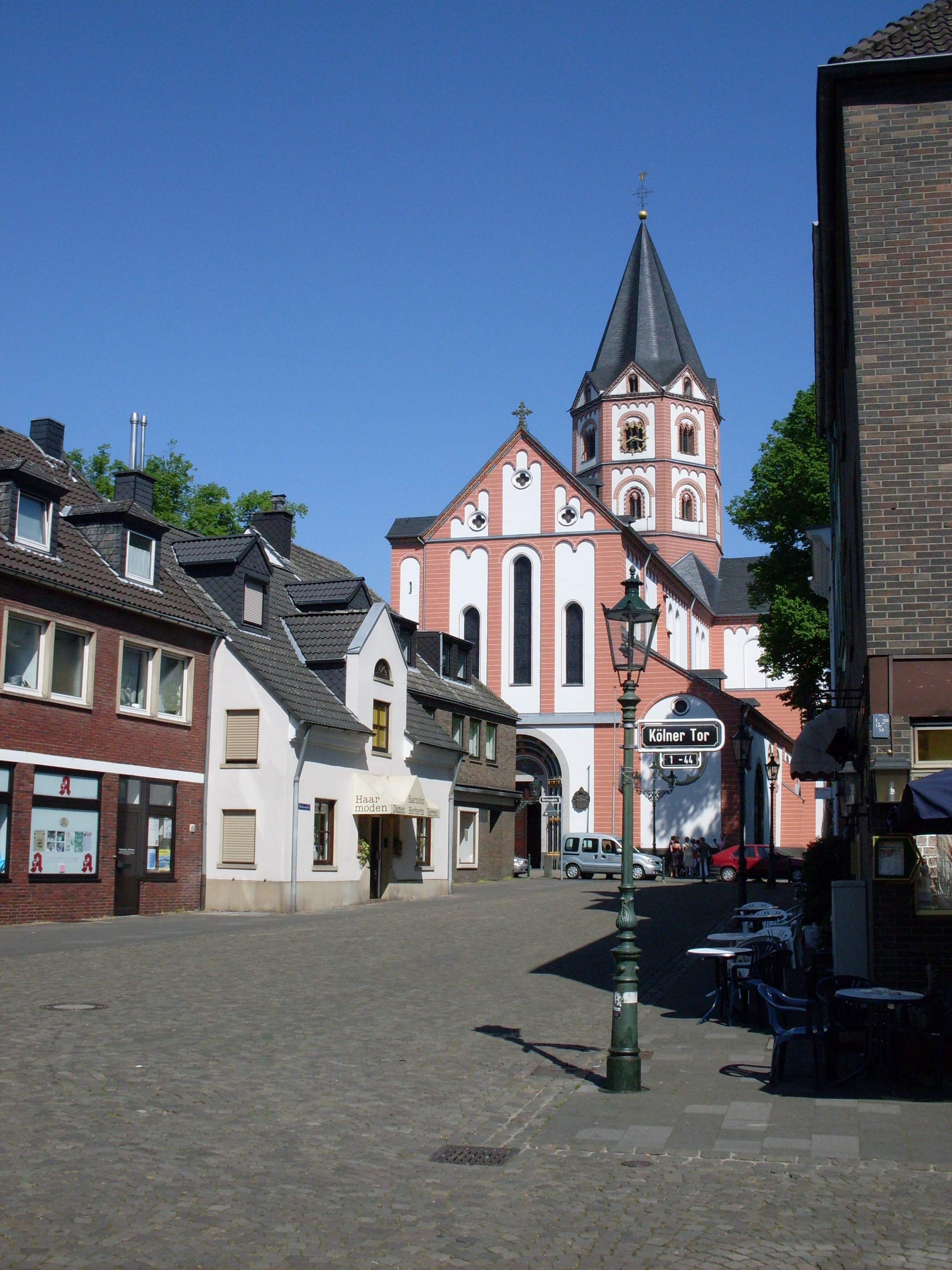 Düsseldorf-Gerresheim Flachsmarkt und Basilika